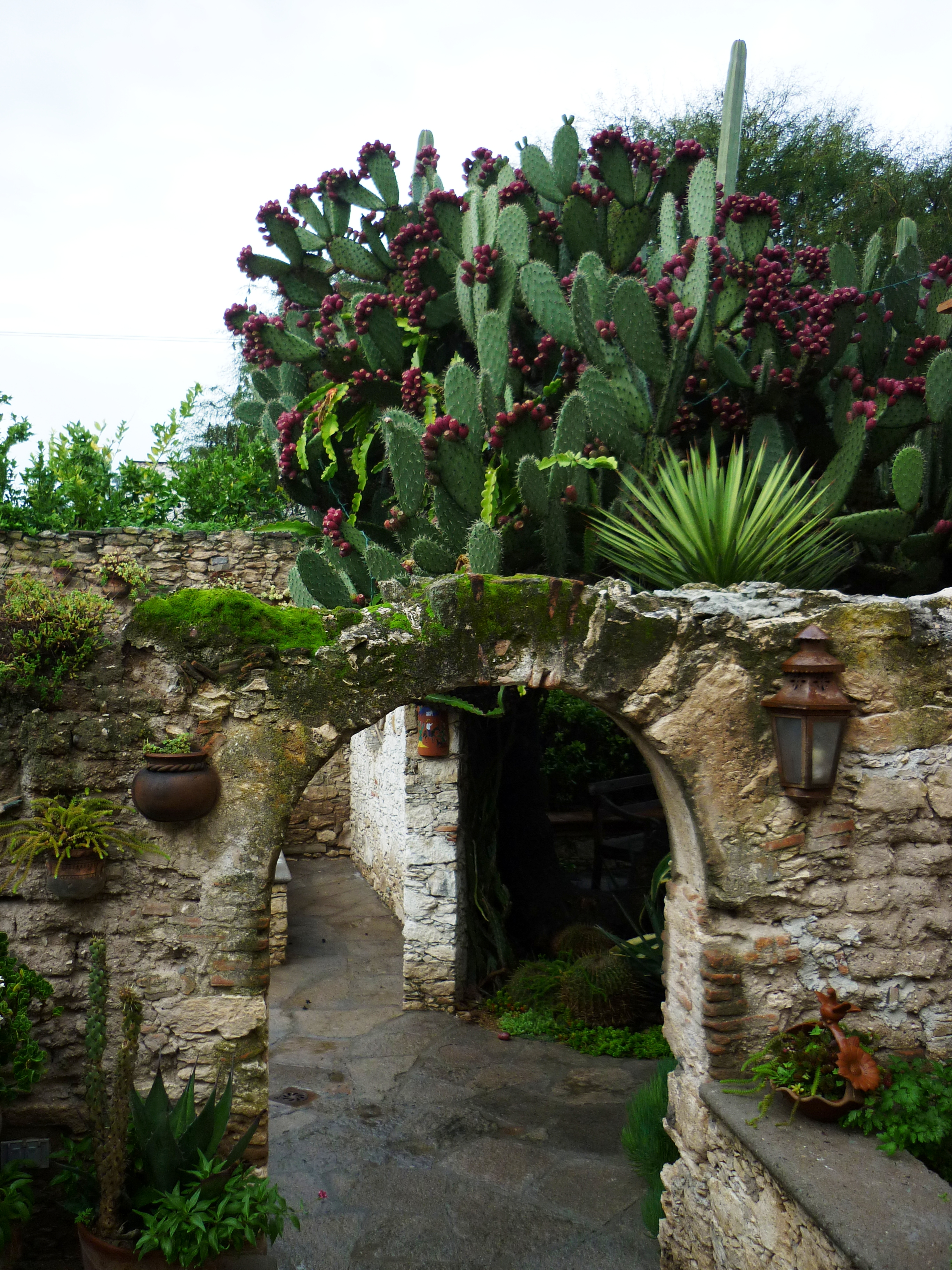 Típica arquitectura mexicana en Mineral de Pozos, Guanajuato